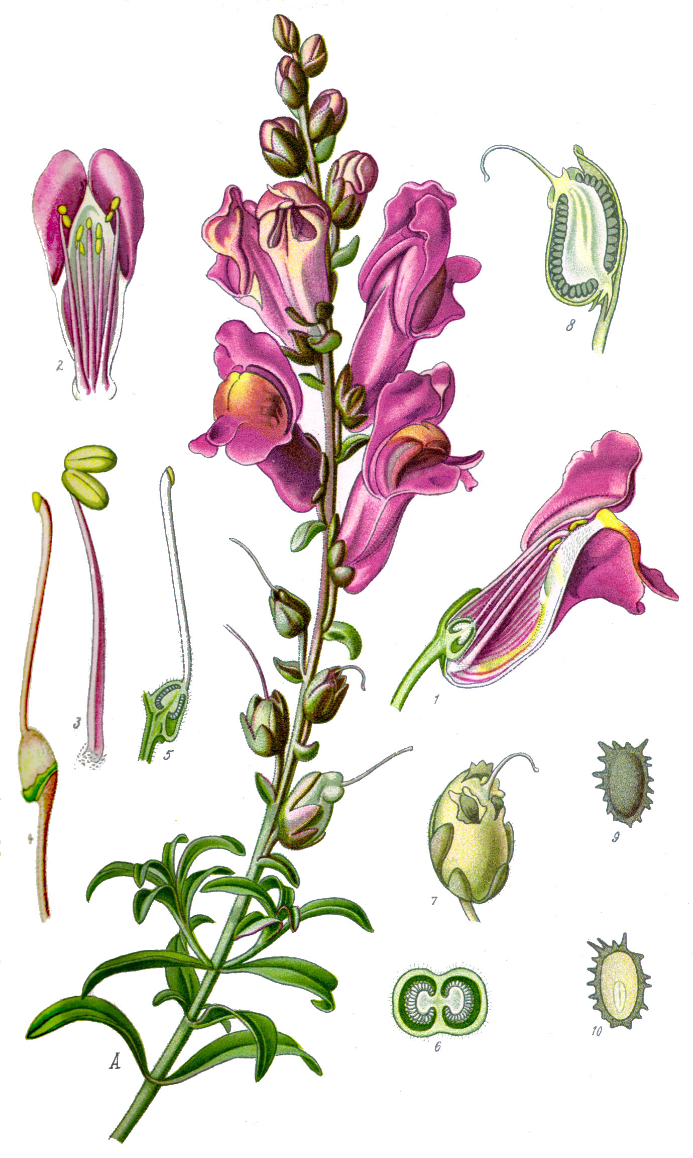 Name Antirrhinum majus ;Family:Scrophulariaceae Original book source: Prof. Dr. Otto Wilhelm Thomé Flora von Deutschland, Österreich und der Schweiz 1885, Gera, Germany Permission granted to use under GFDL by Kurt Stueber